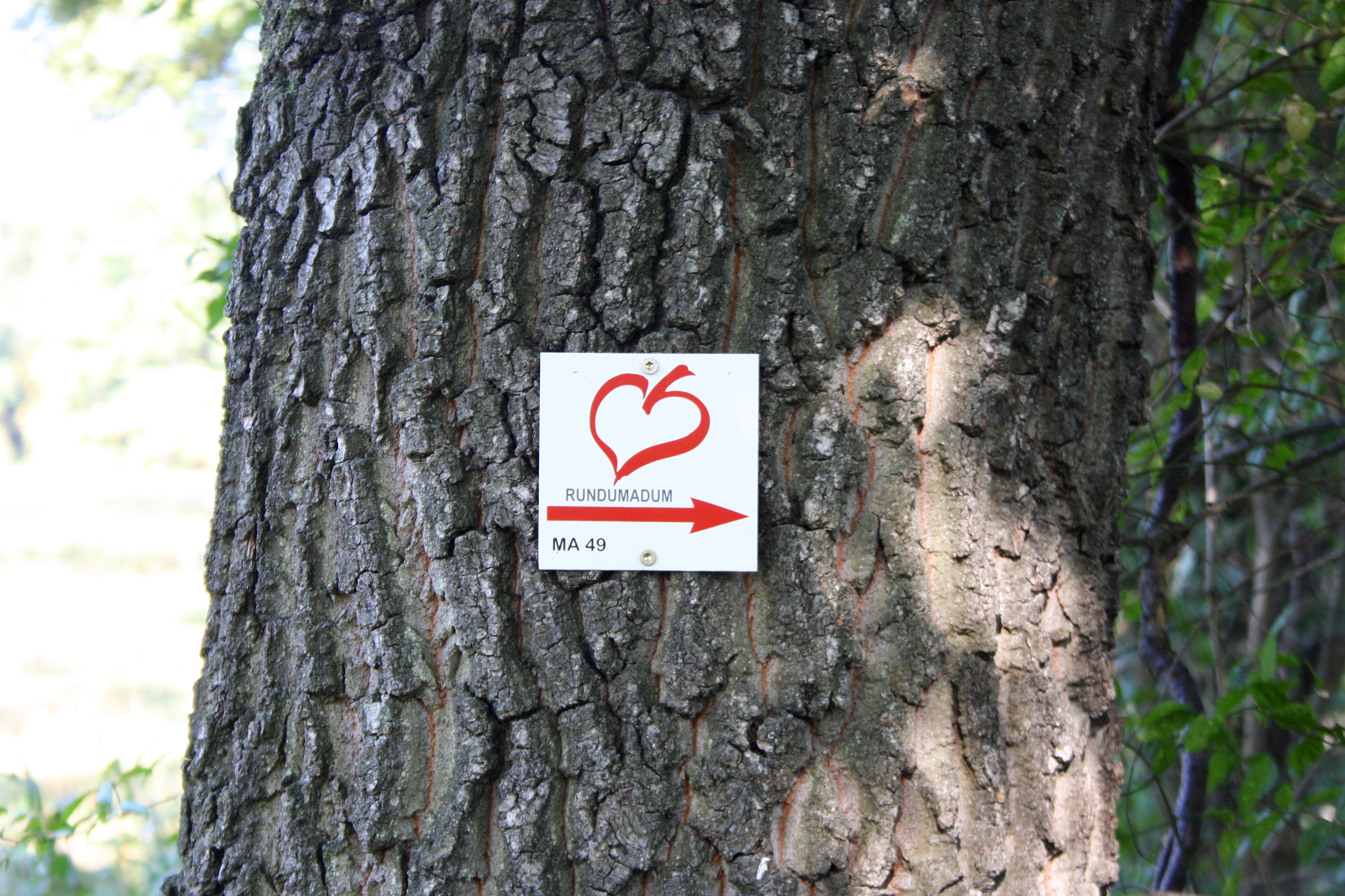 Schild des Wanderwegs Rundumadum zwischen Auerwiese und Gemeindewiese im Maurer Wald in Wien.